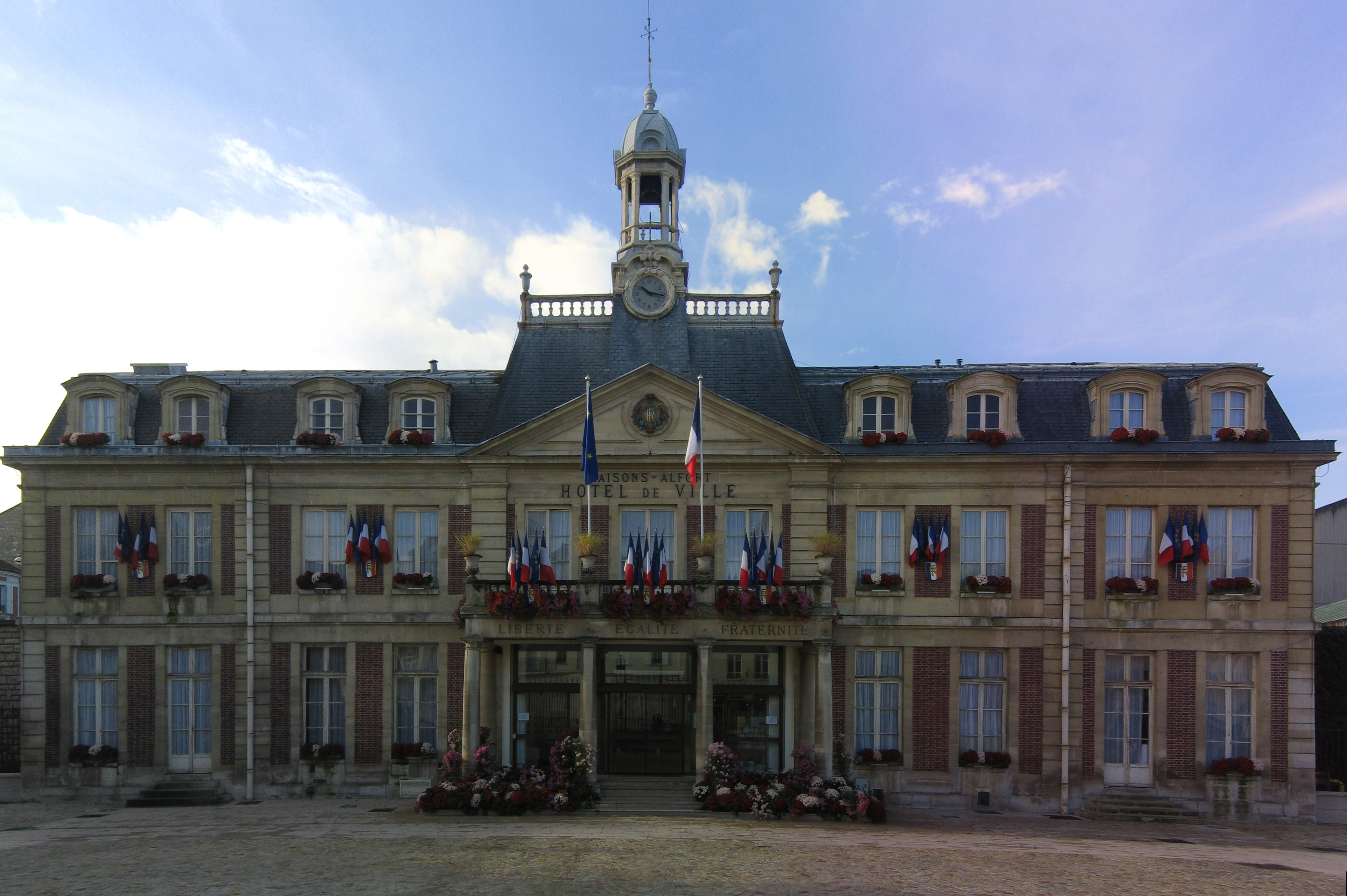 La mairie de Maisons-Alfort, image créé à partir de 4 photos assemblées avec hugin, les lignes verticales ont également été corrigées avec hugin